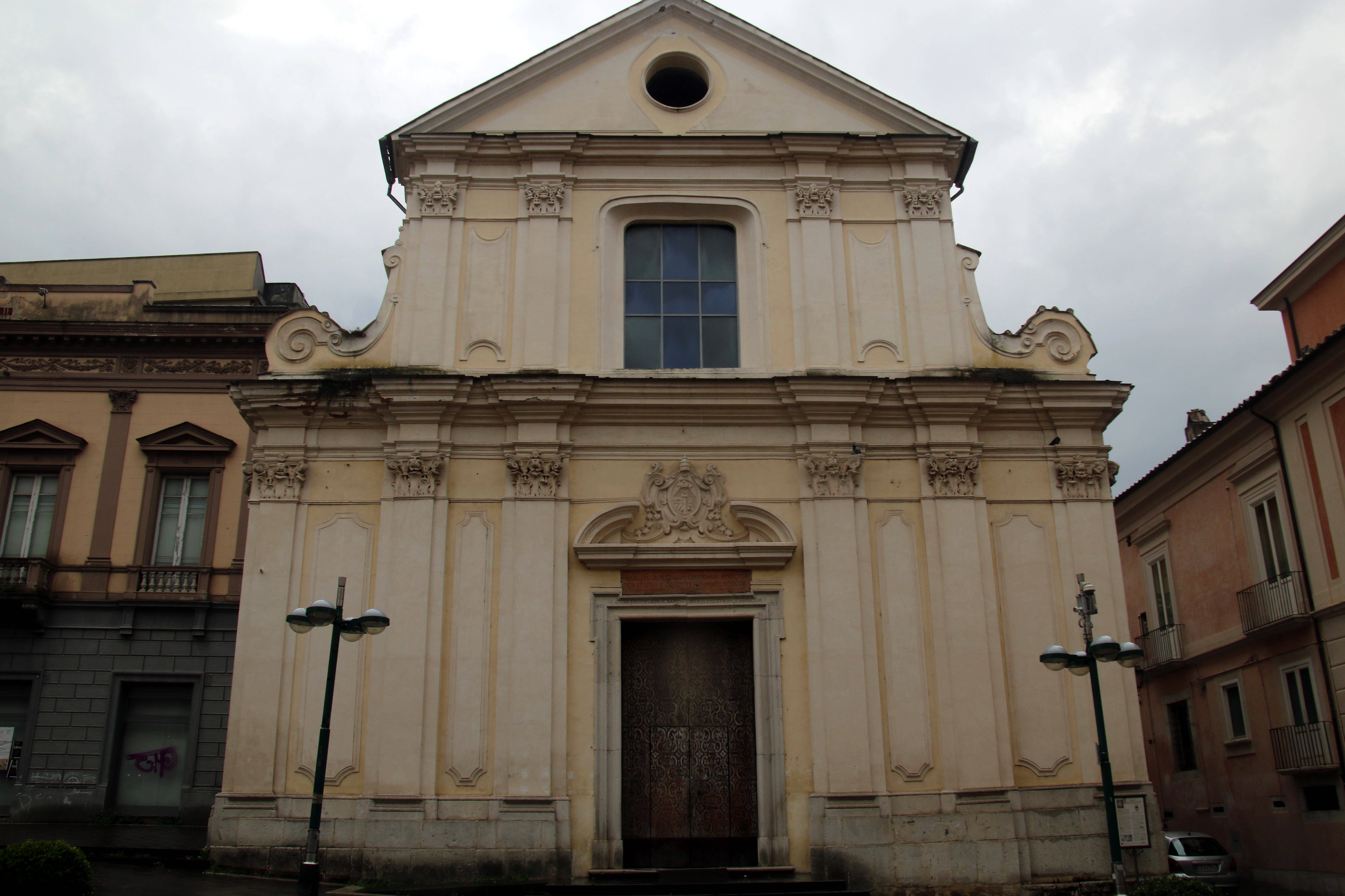 Chiesa di San Bartolomeo (Benevento), facciata